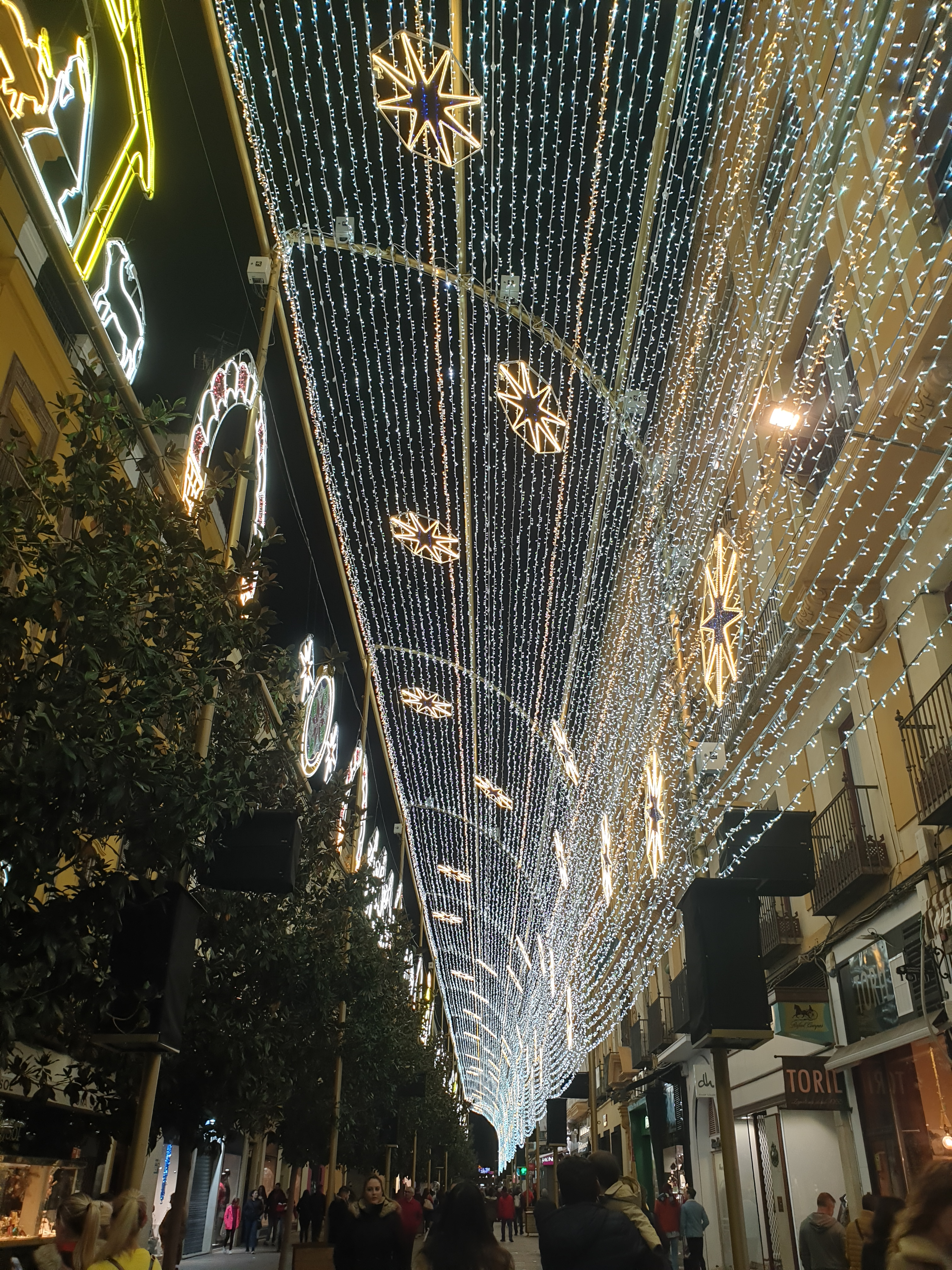 La calle Cruz Conde de Córdoba en Navidad